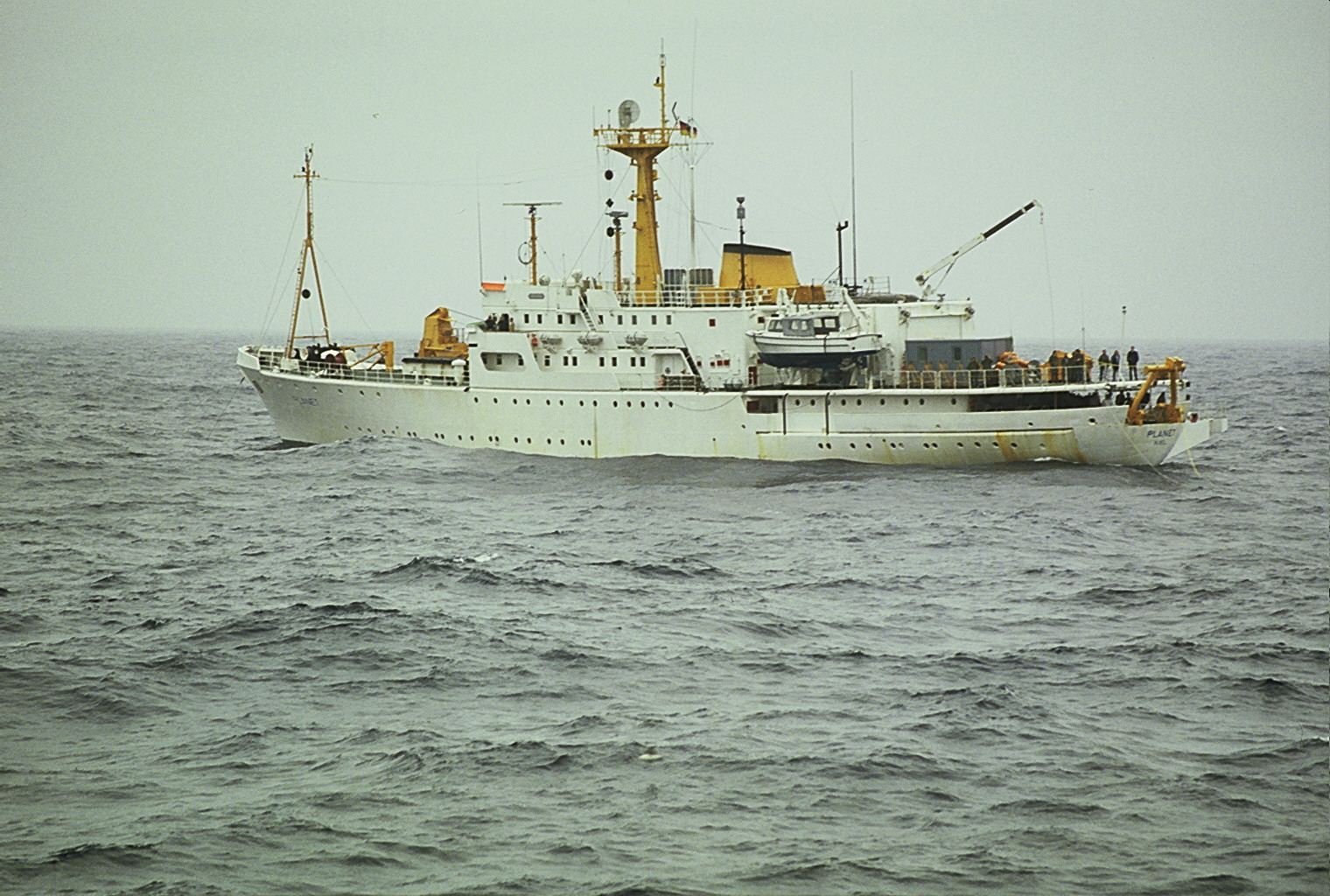 Fotografie des ankernden Forschungsschiffs Planet II vor der Südküste Islands